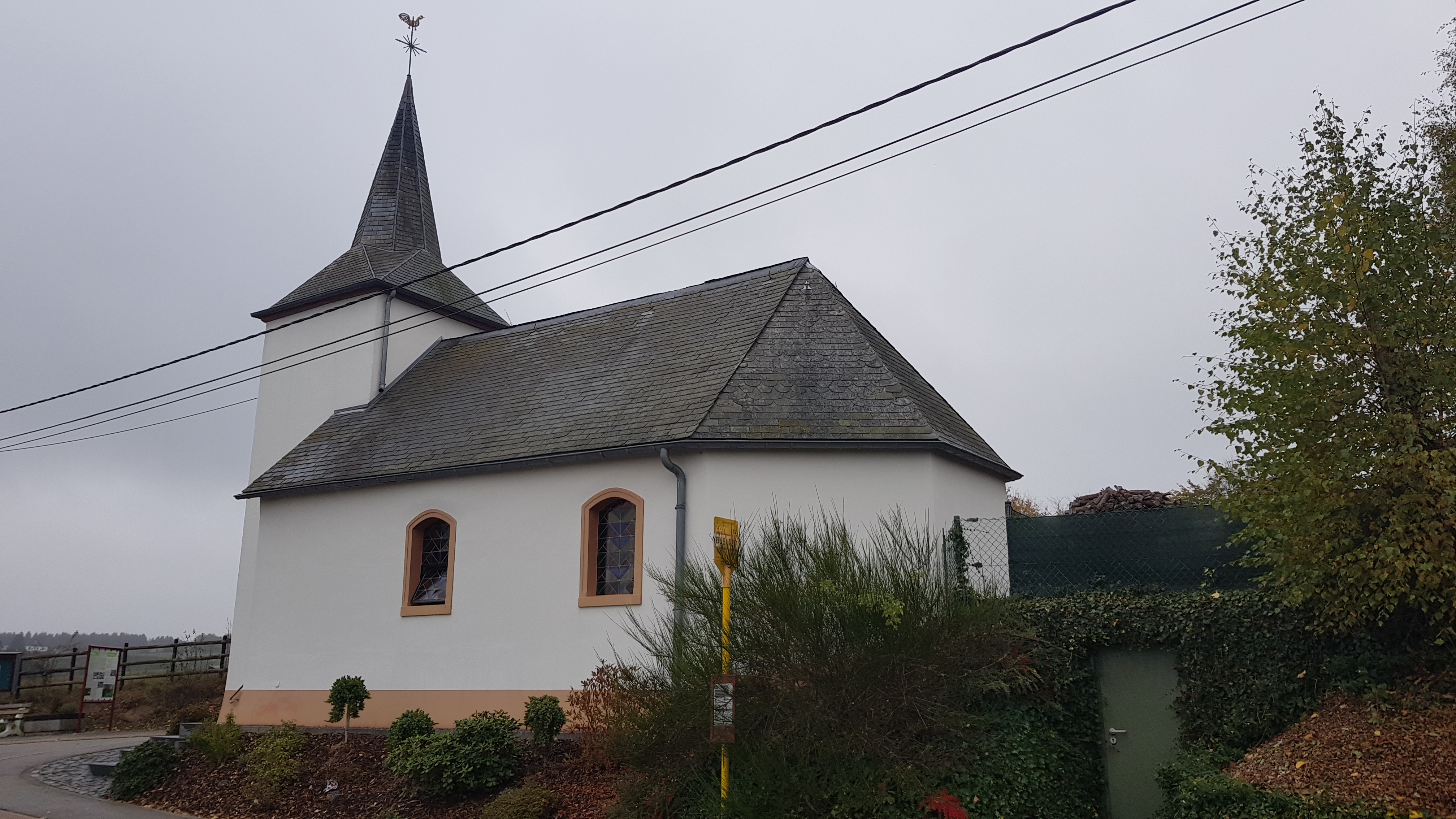 Kapelle St. Brictius, Merlscheid, Büllingen, Belgien This photo of immovable heritage has been taken in the Walloon Region